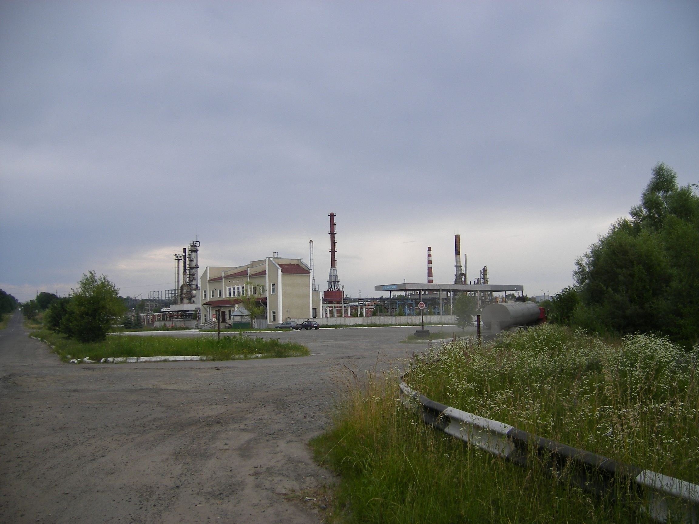 Oil refining in Drohobych